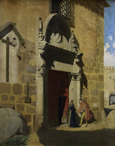 Portada del Palacio de Munárriz, Toledo.